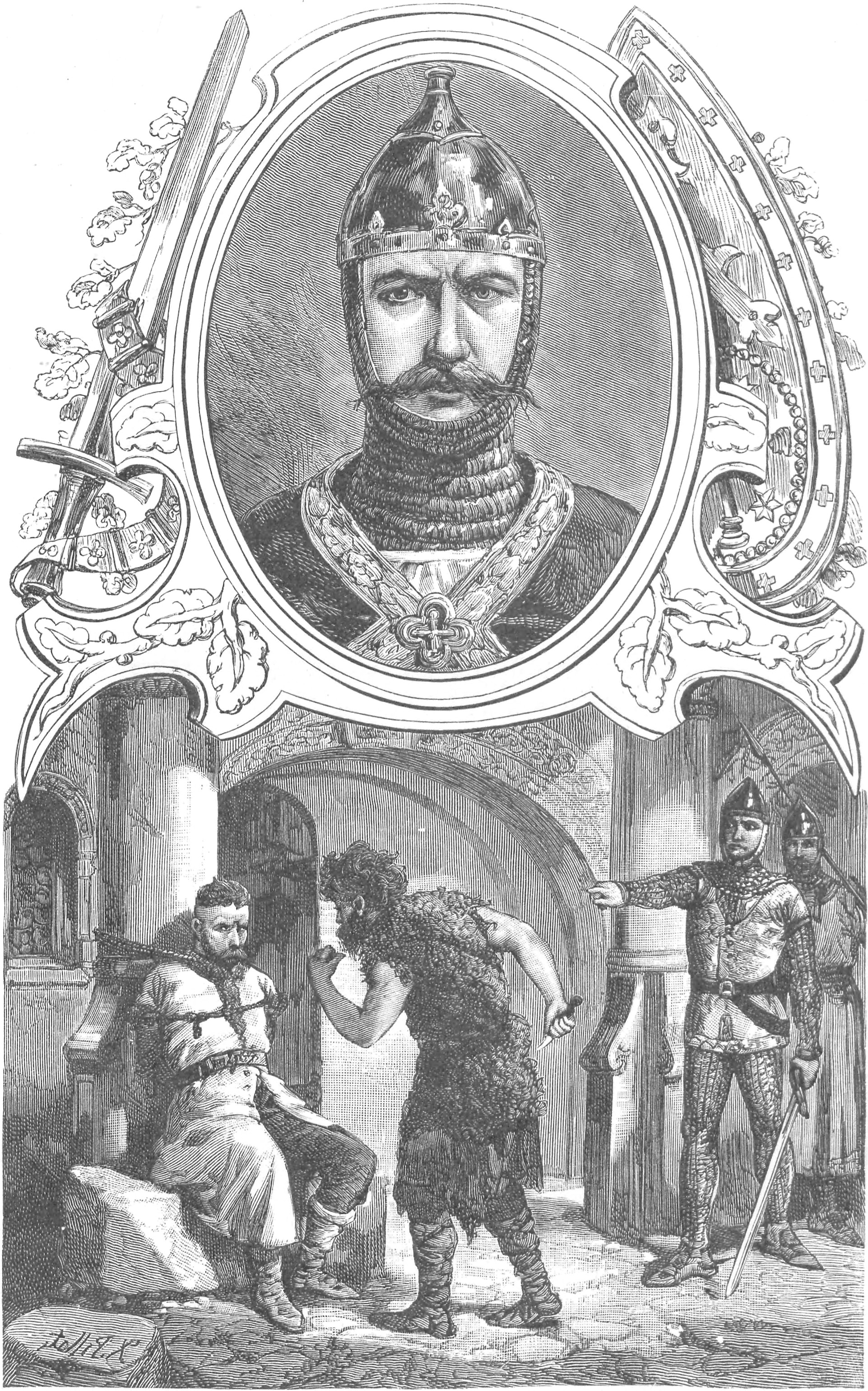 ilustracja z książki „Wizerunki książąt i królów polskich“